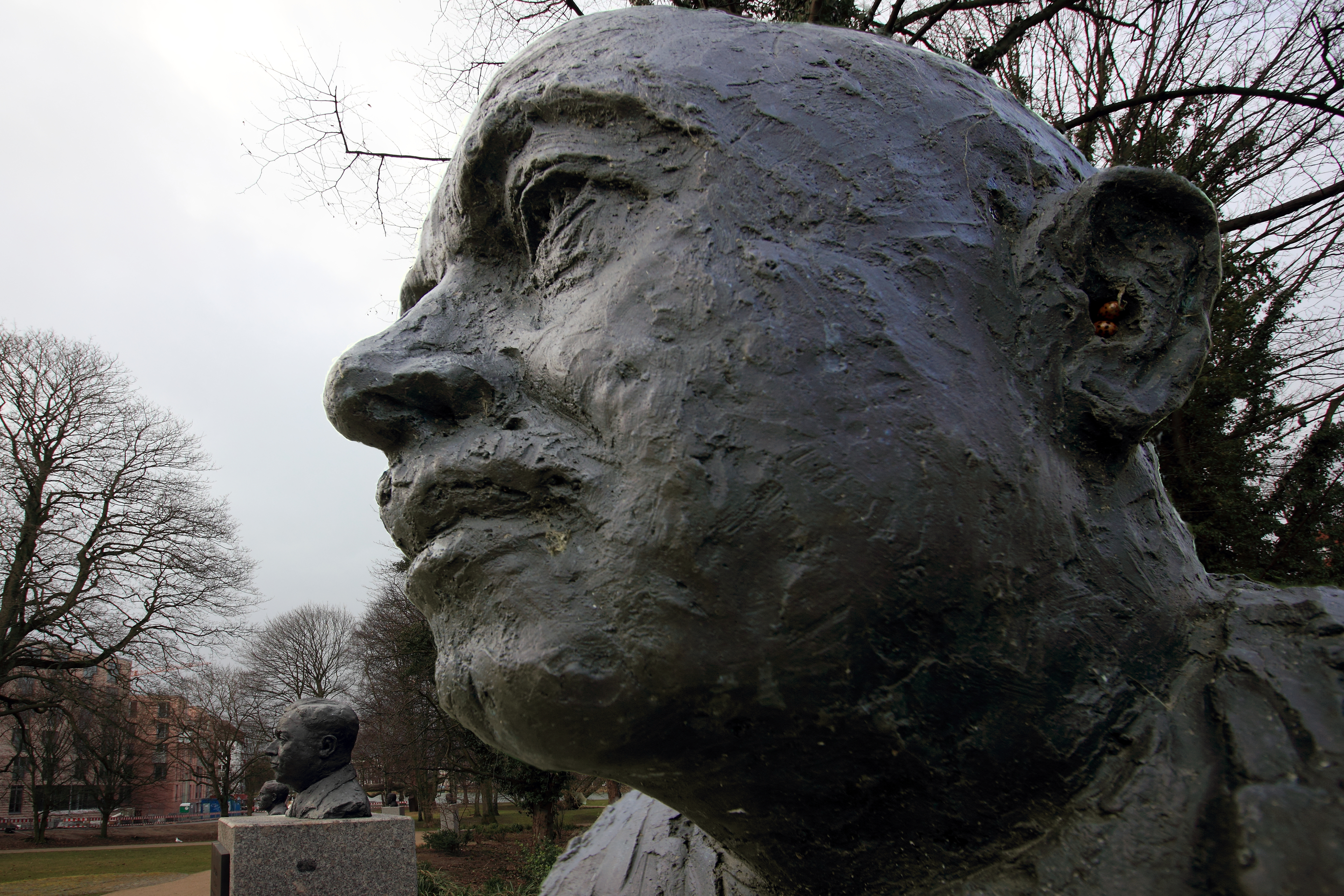 im Ratsdienergarten, Kiel-Altstadt: im Vordergrund Otto Diels-Büste (2015), im Hintergrund Kurt Alder-Büste (2016) von dem Bildhauer Jörg Plickat.